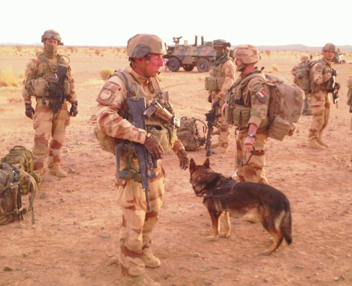 Equipe cynophile intégrée dans un groupe de combat au Mali